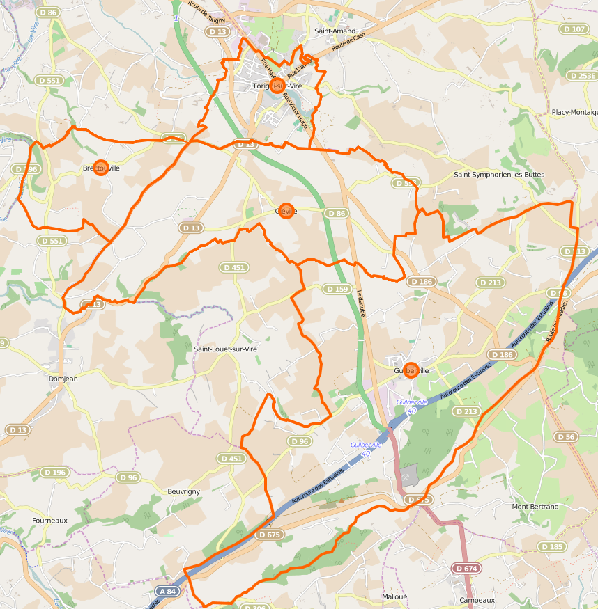 Carte de Torigny-les-Villes , commune nouvelle